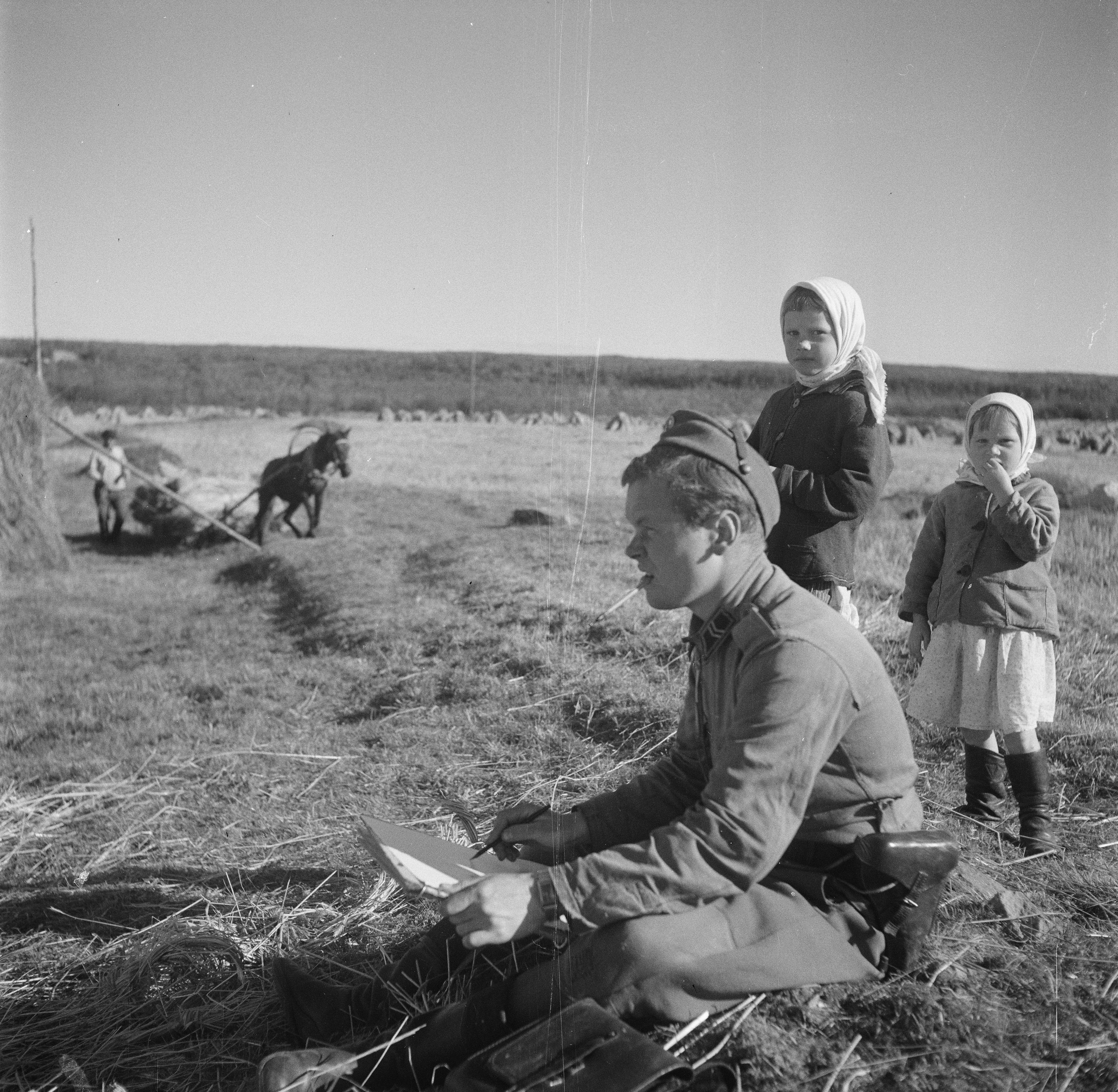 TK-piirtäjä E.Enroth piirtää karjalaisia.